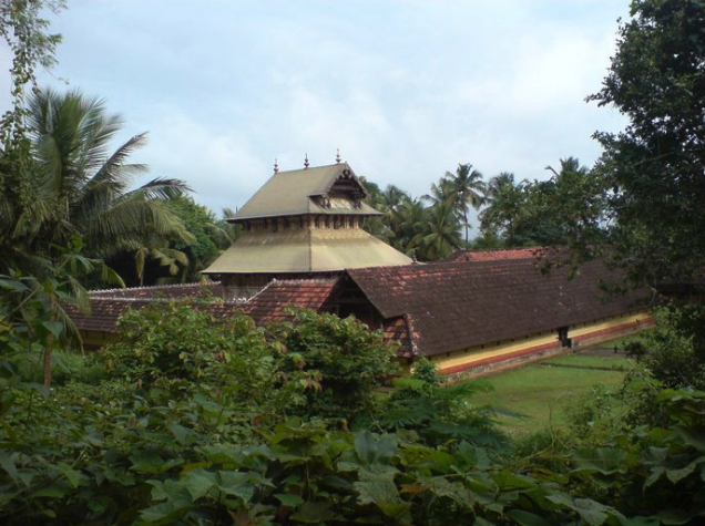 നെടുമ്പുര ശിവക്ഷേത്രം